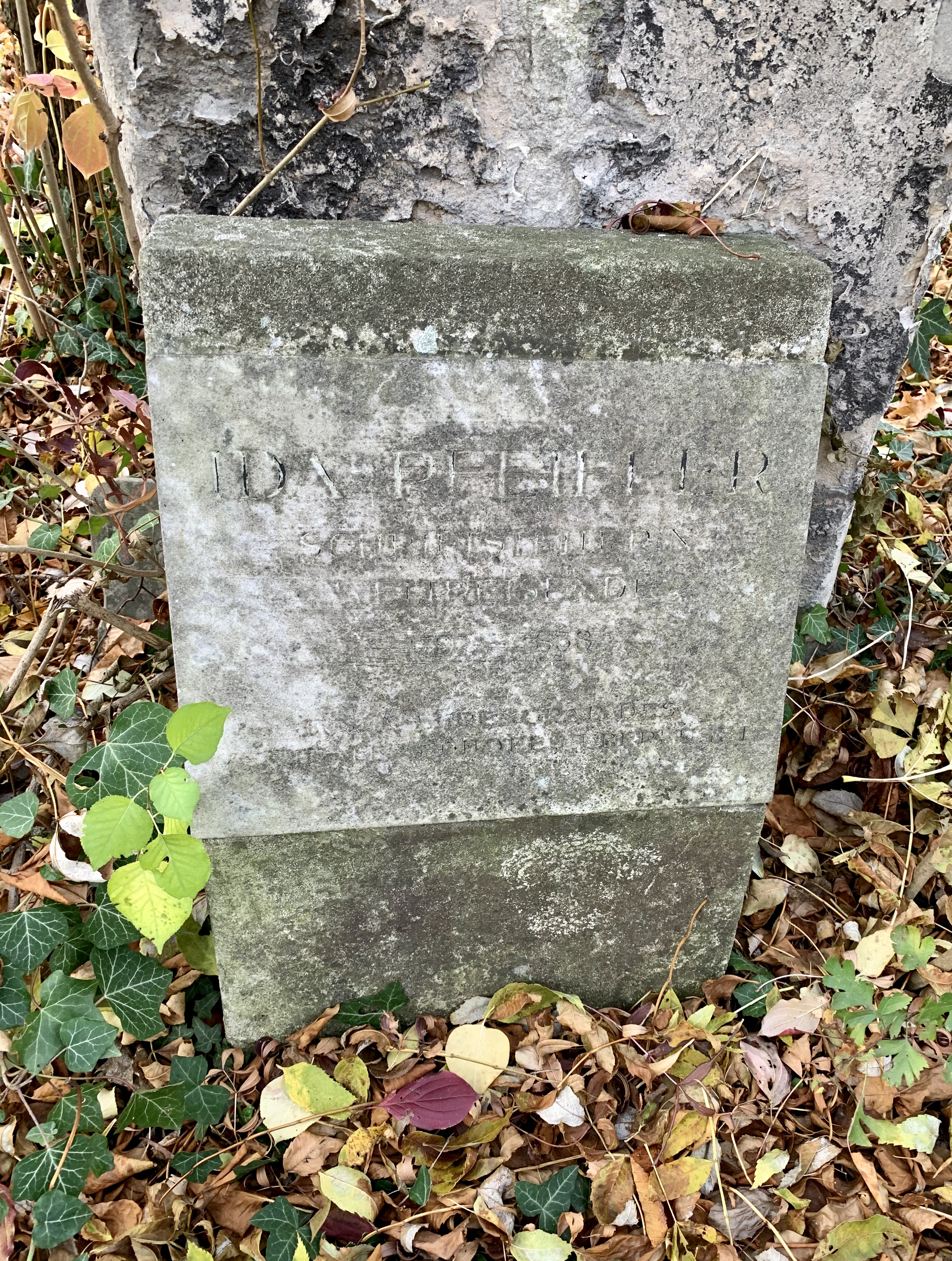 Das ursprüngliche Grab der Ida Pfeiffer auf dem Sankt Marxer Friedhof in Wien